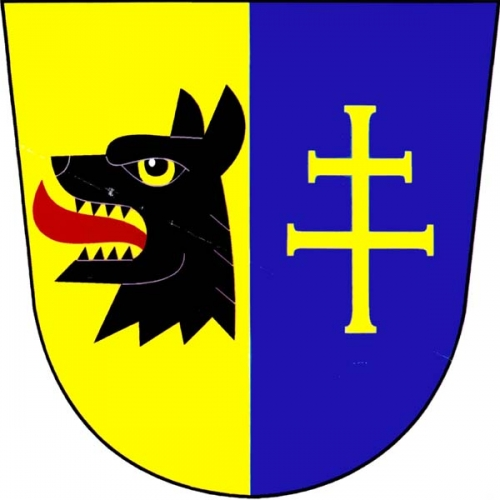 znak, Sedliště, okres Svitavy